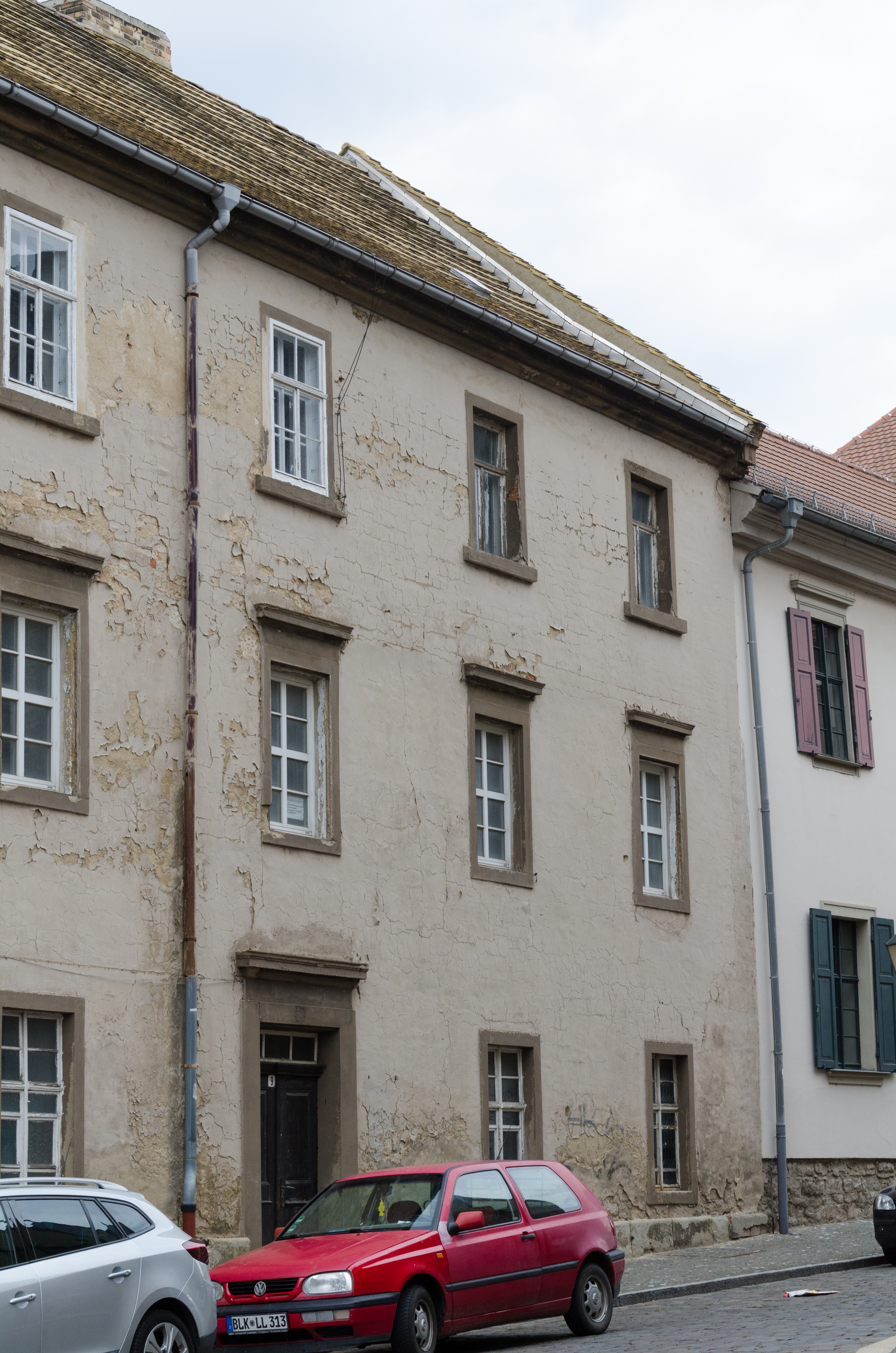 Zeitz, Michaeliskirchhof 9